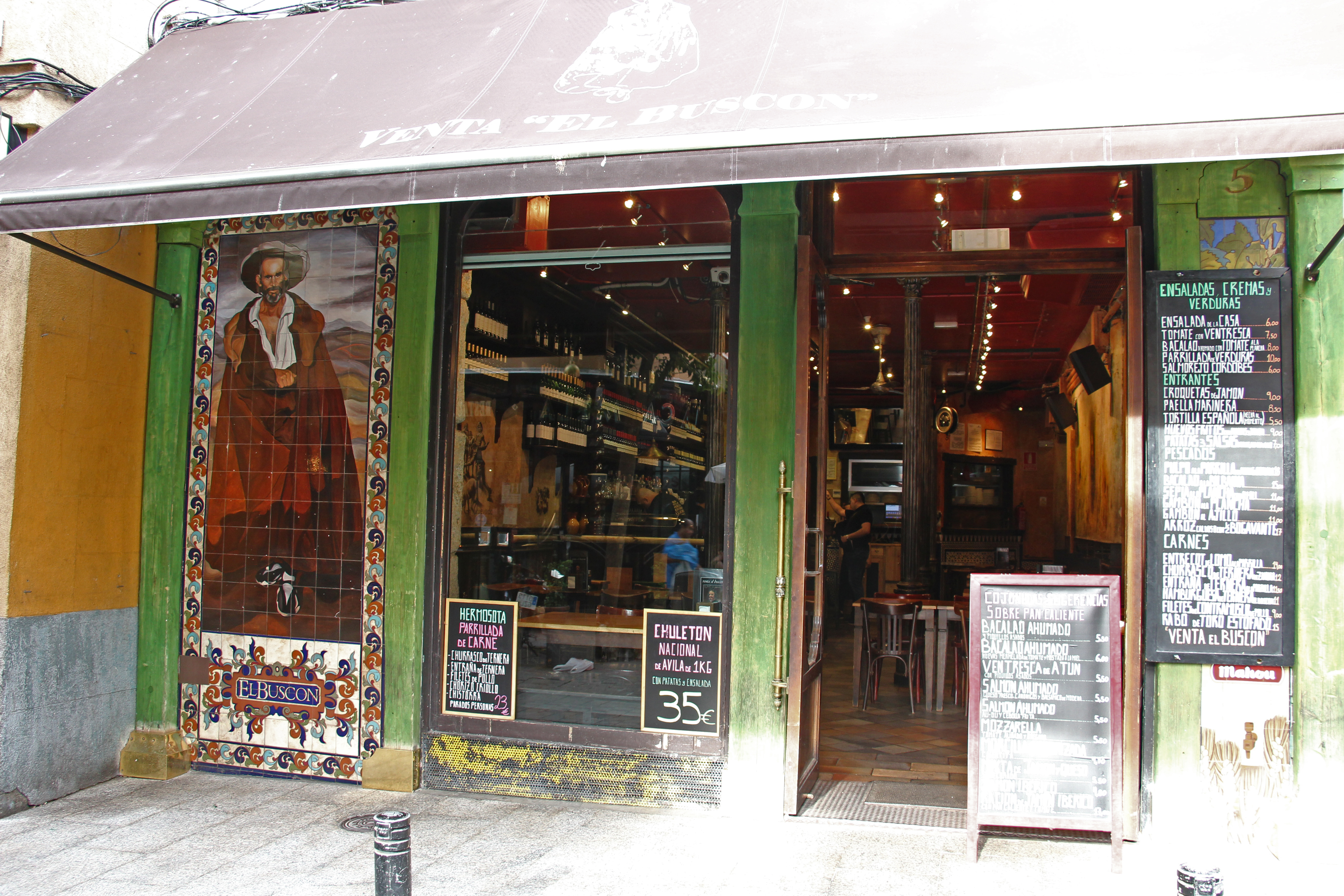 Sol / Calle de la Victoria El Buscon bar & restaurant.